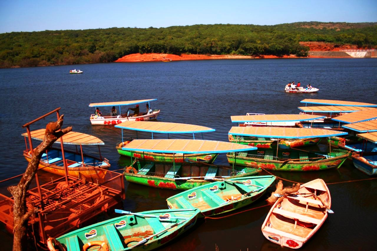 Boats on Venna lake in Mahabaleshwar